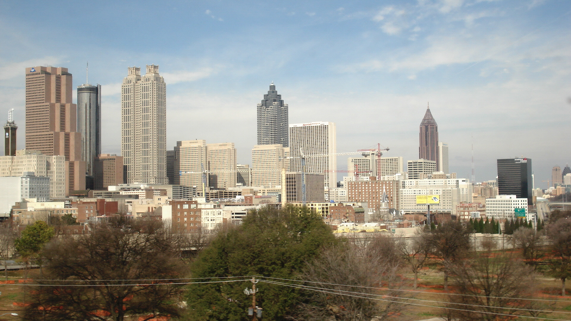 Atlanta, Georgia